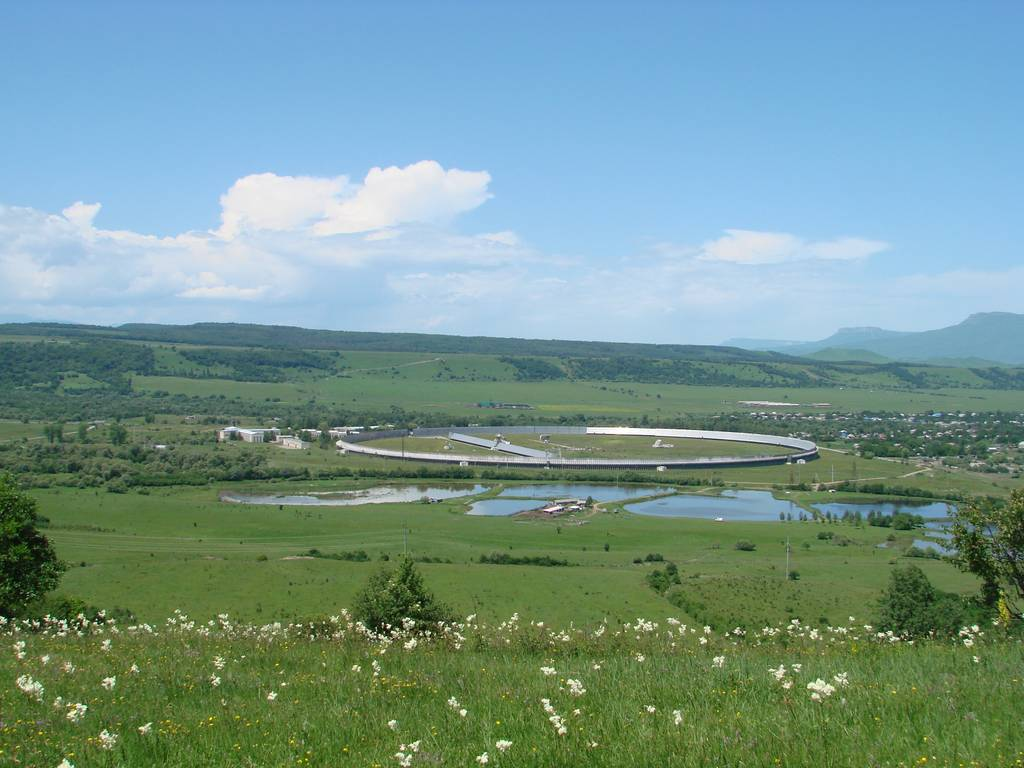 Вид на радиотелескоп РАТАН-600 и запруду на реке Хуса-Кардоникская